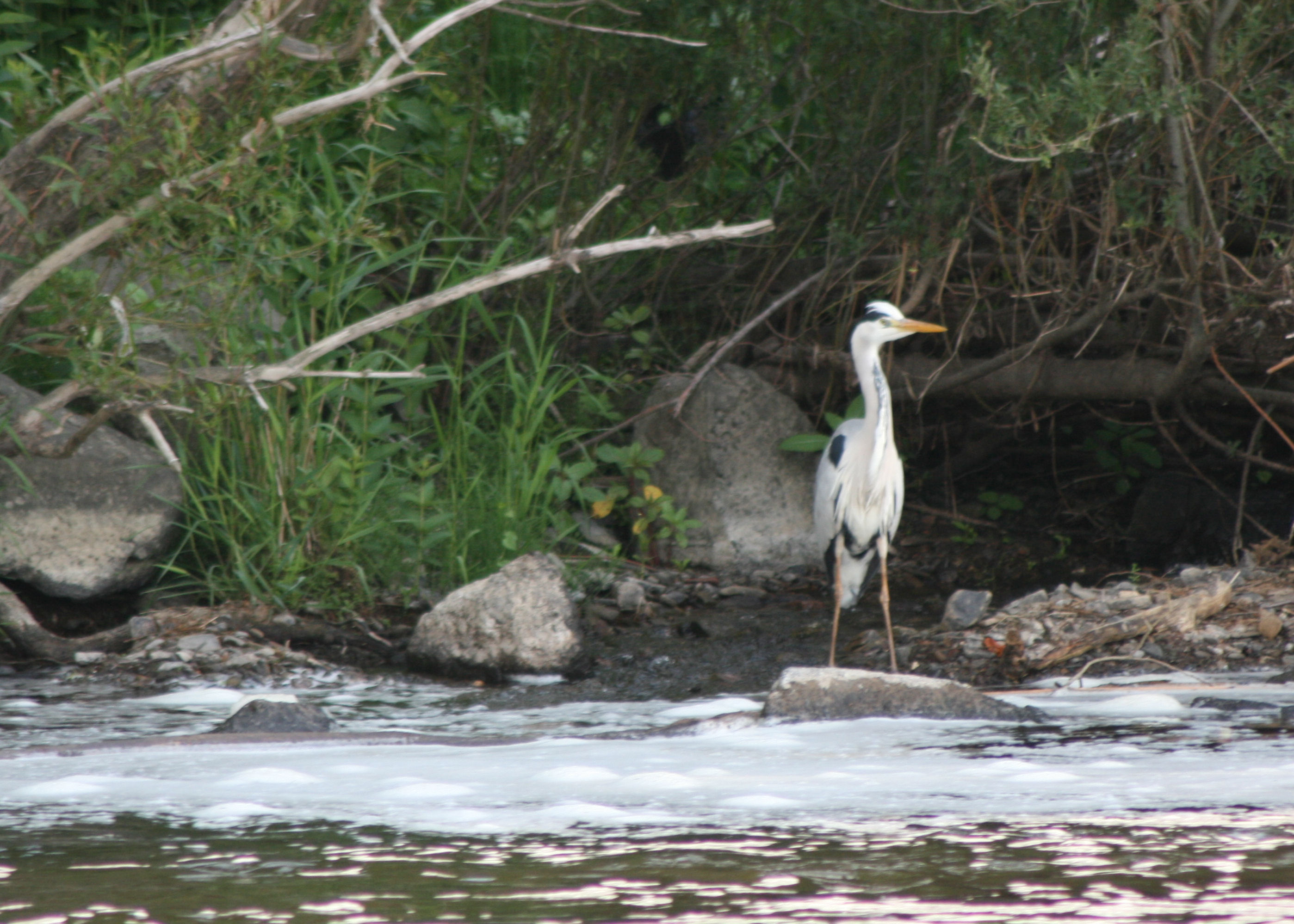 Graureicher an der Sieg